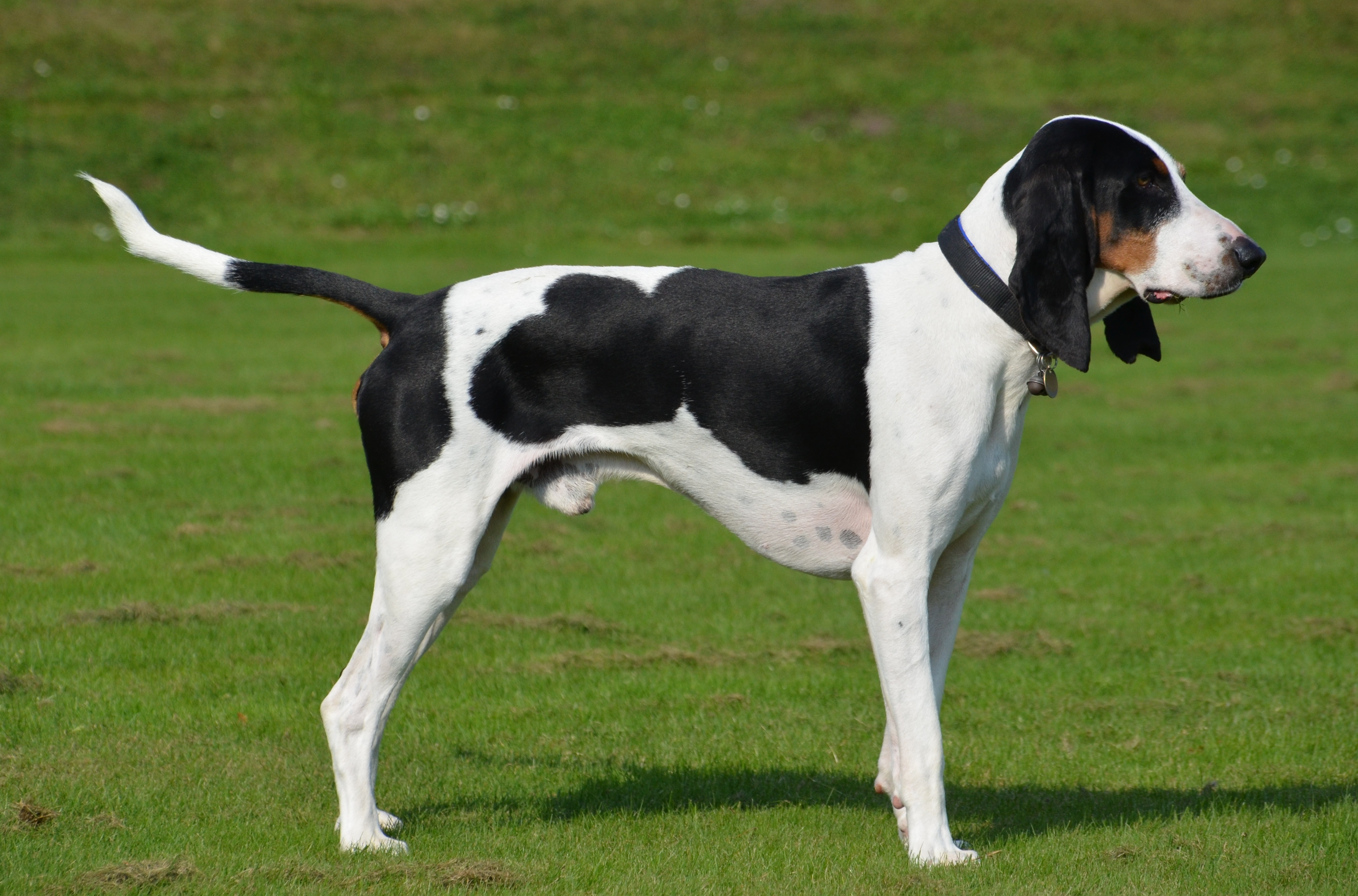 Grote Laufhundedag 2011 Zondag 25 september 2011